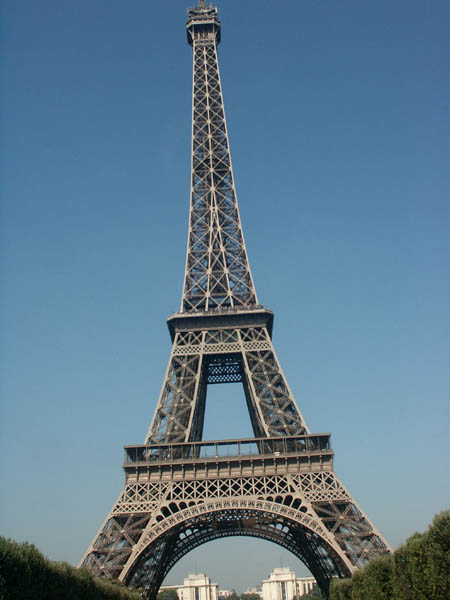 Paris, Eiffel Tower